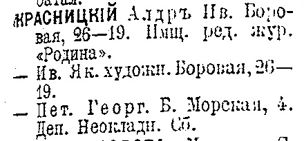 Вырезка о месте проживания Красницких в Санкт-Петербурге. Алфавитный указатель Жителей города С.-Петербурга, Царскаго села, Павловска и Гатчина. — СПб.: Весь Петербургъ, 1896. — Т. III. — С. 165